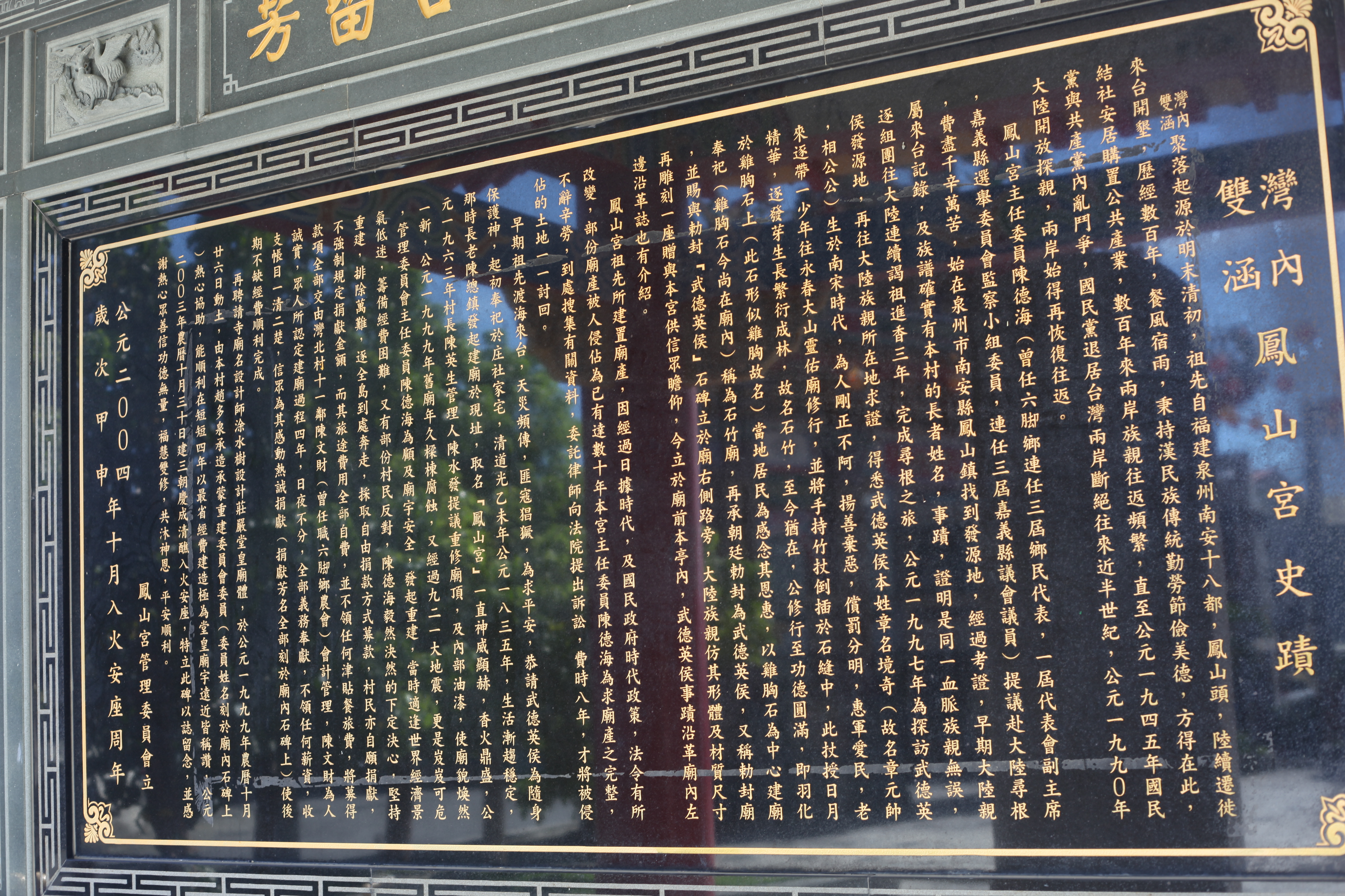 嘉義縣六腳鄉灣北村鳳山宮